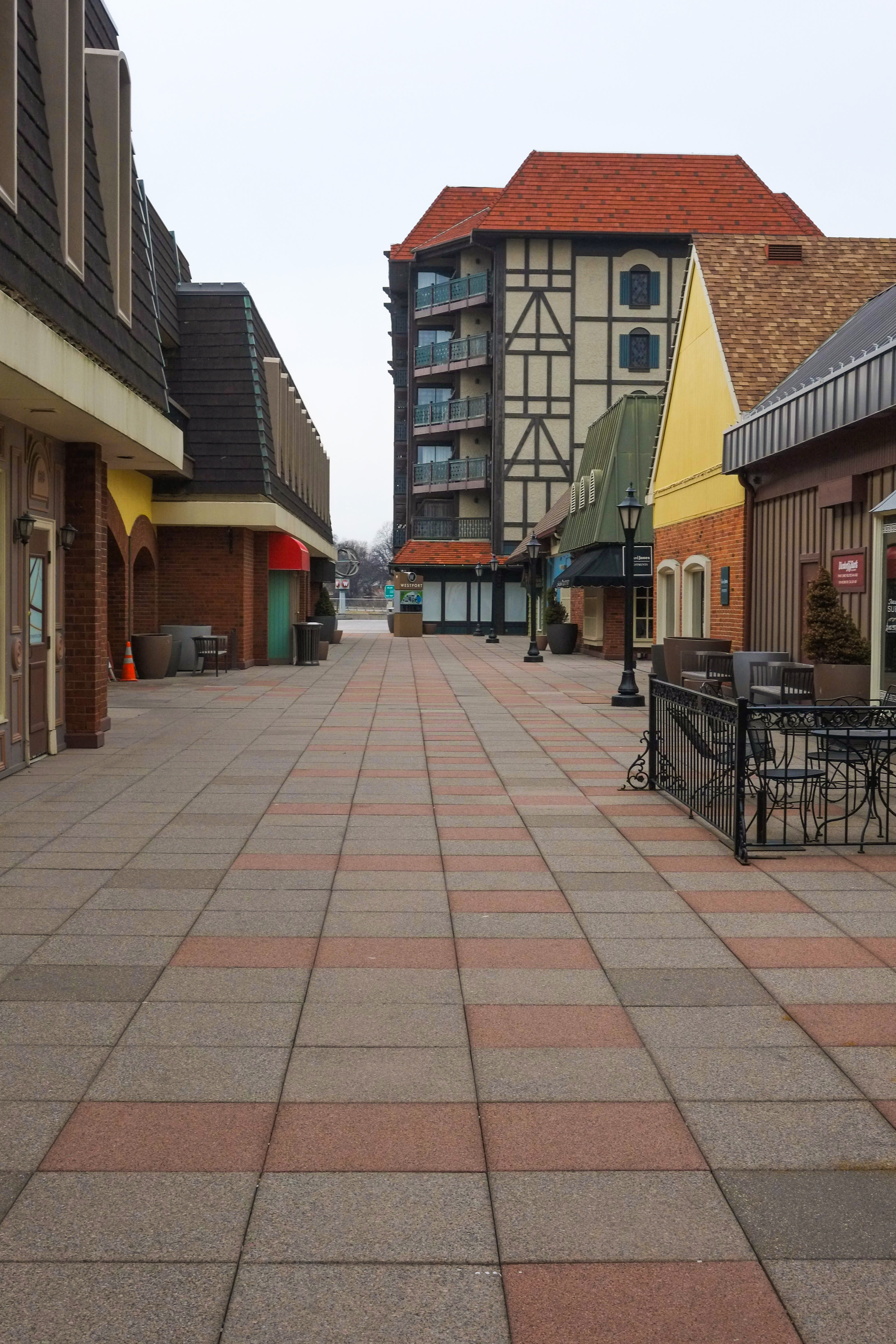 Westport Plaza